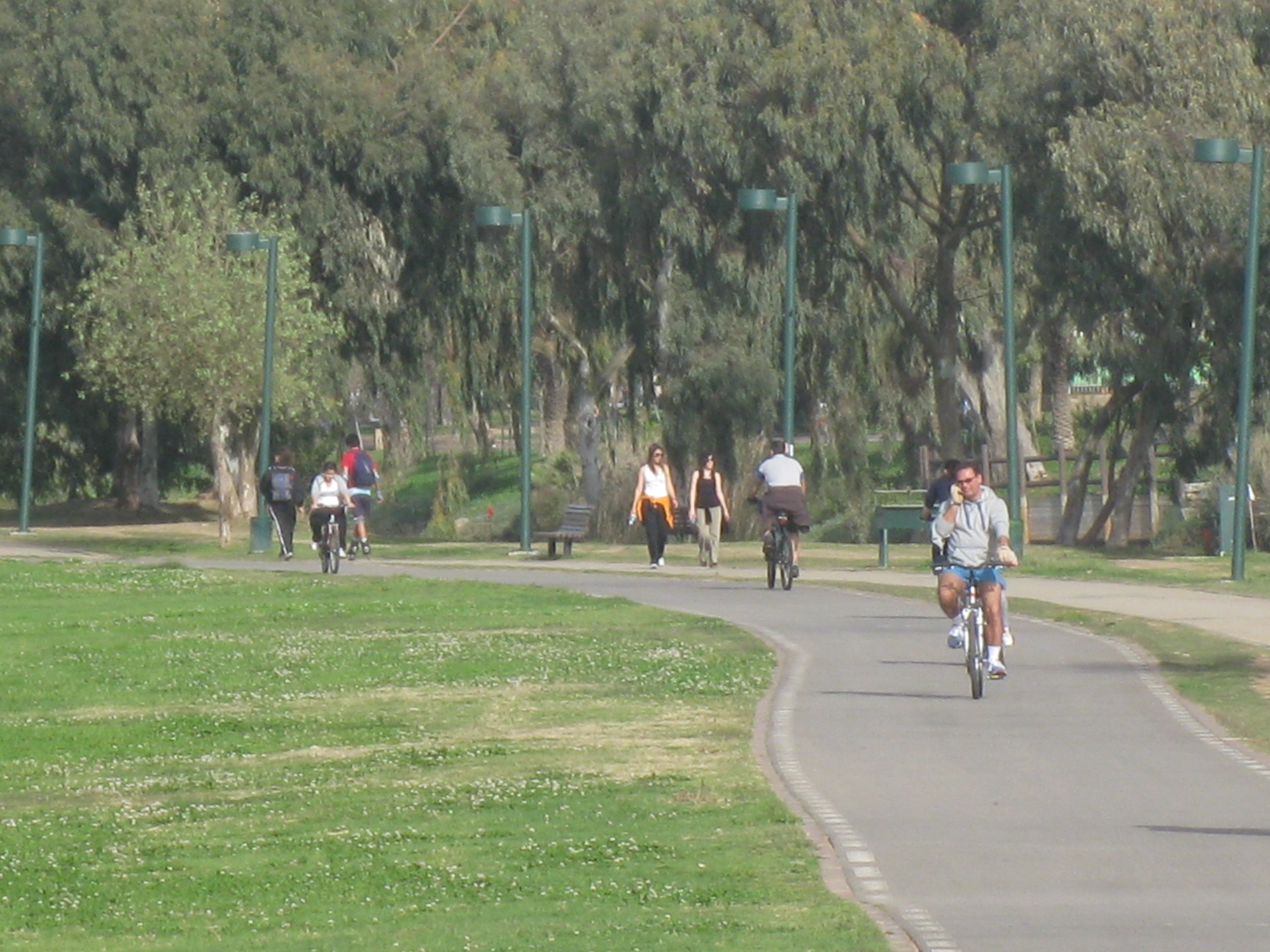 The Yarkon Park פארק הירקון